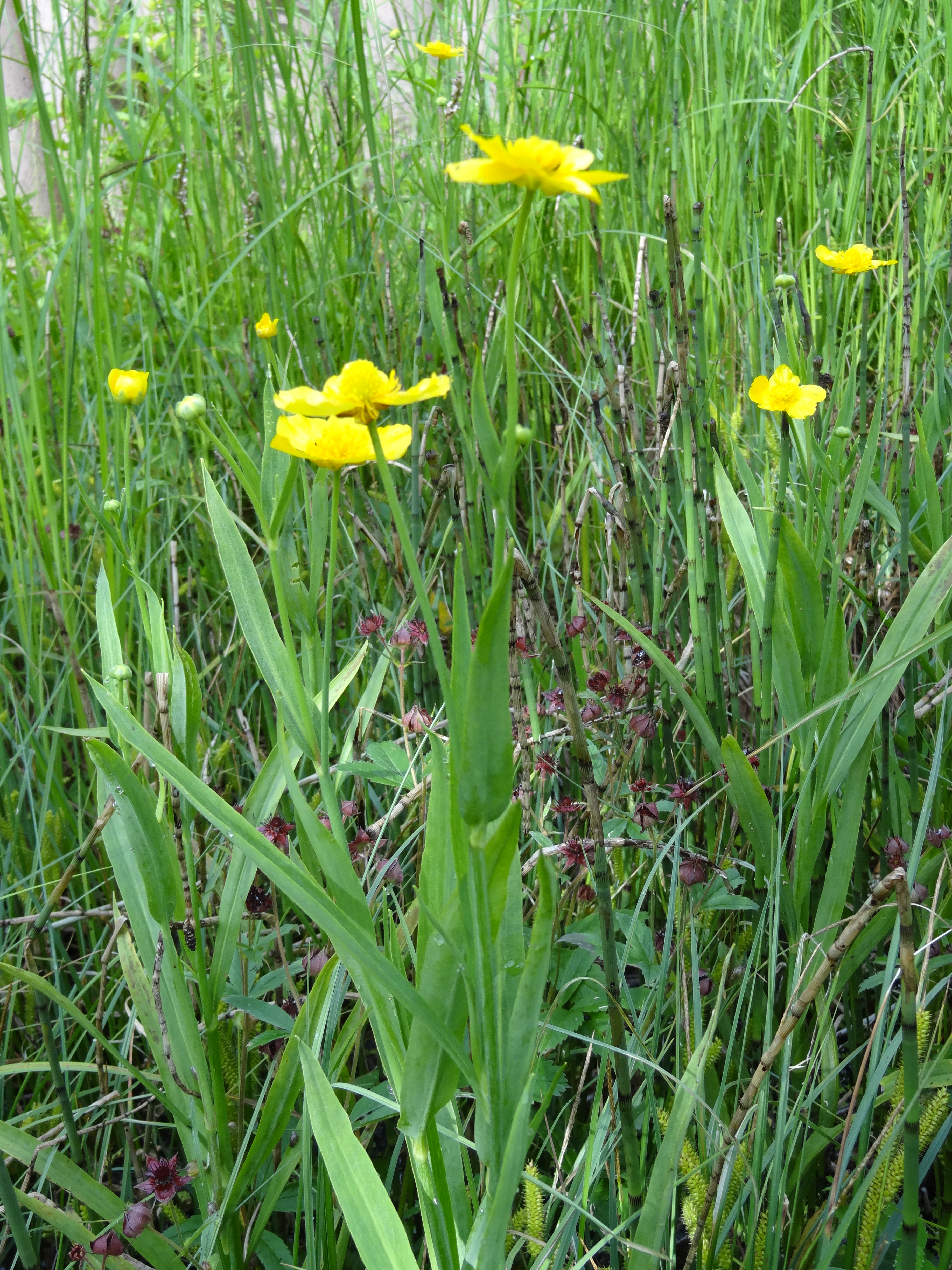 Ranunculaceae, Großer Hahnenfuß, Zungen-Hahnenfuß Deutschland, Bayern, Oberfranken, Selbitz Photo: U.Schmidt, 28.VI.2012